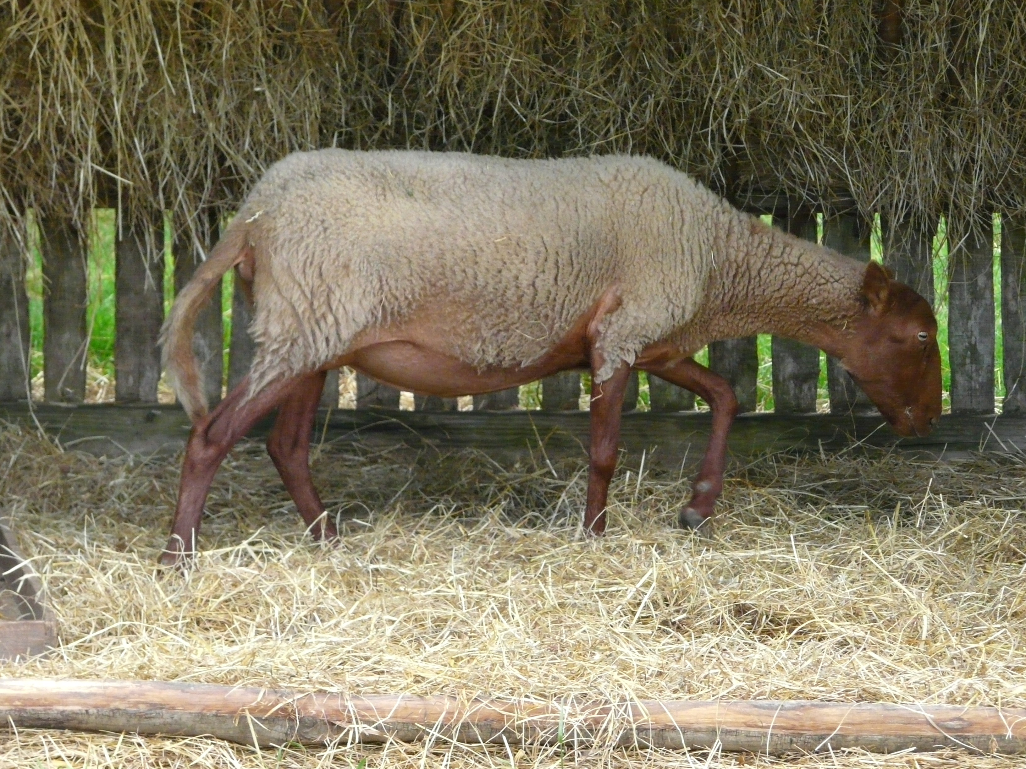 Mouton solognot, Grand parc du Puy du Fou, Vendée, France